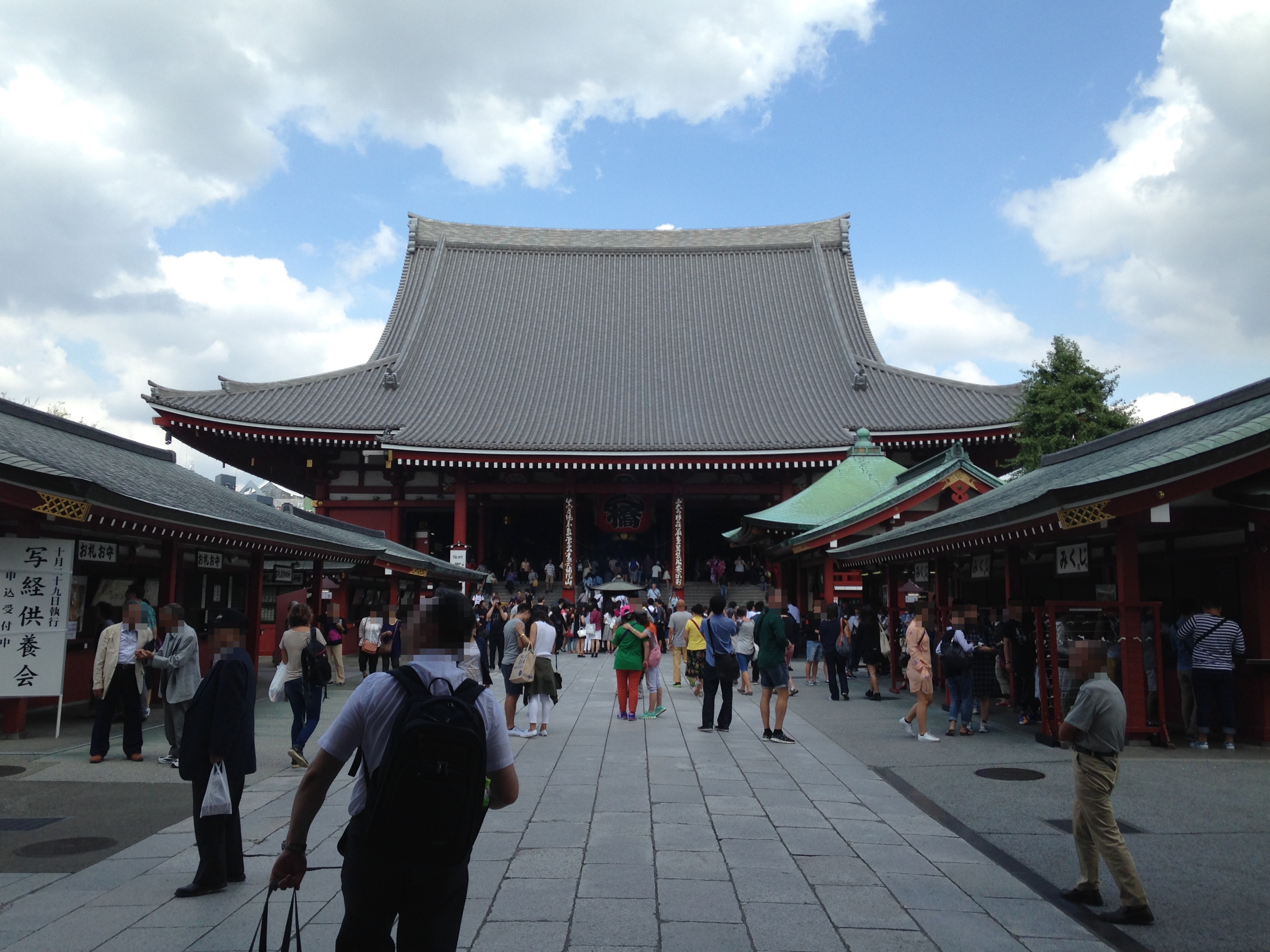 浅草寺・本堂